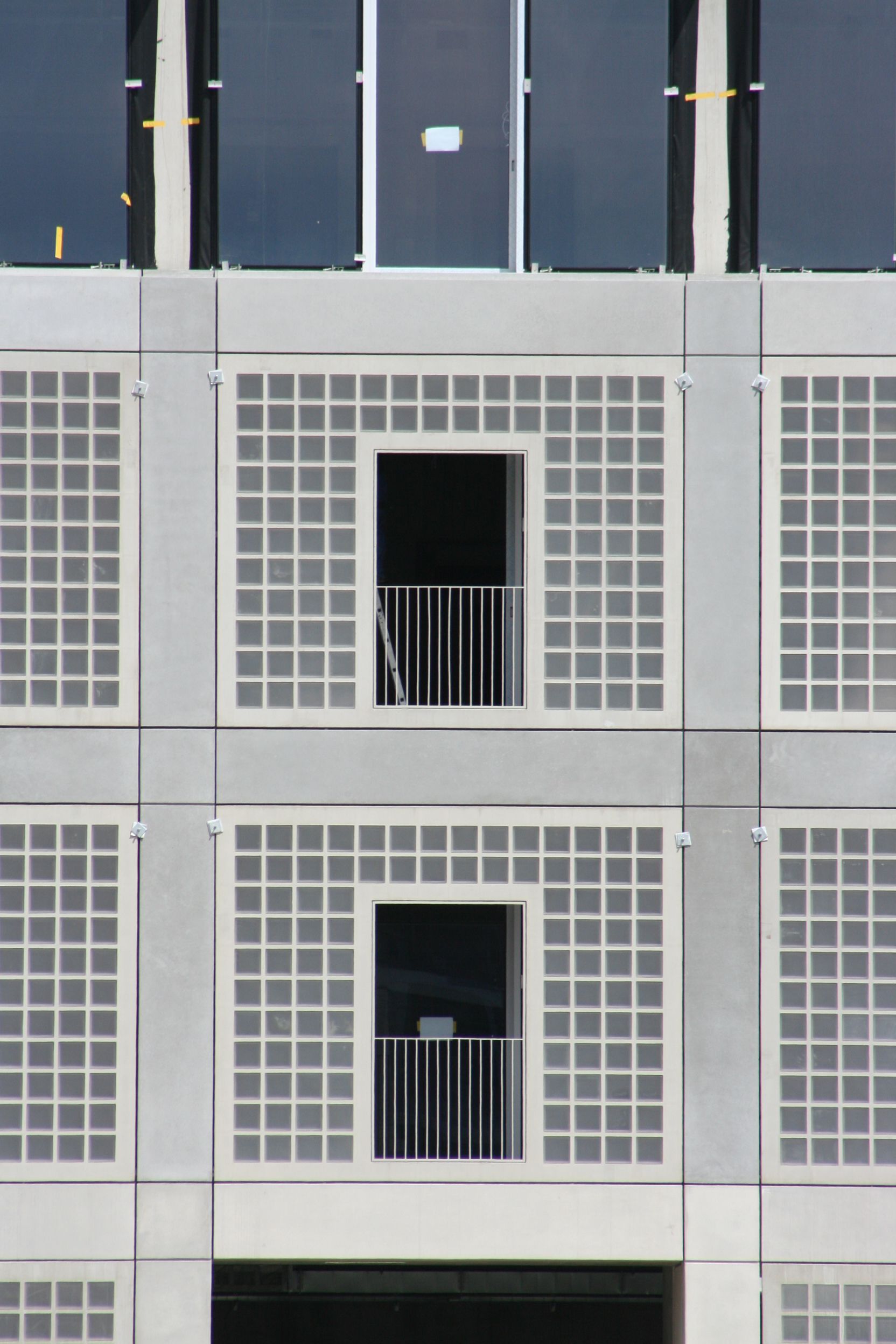 Neubau der Stadtbibliothek Stuttgart (auch Bibliothek 21 genannt) auf dem Stuttgart 21 Areal, zukünftig Mailänder Platz, Fassadendetail